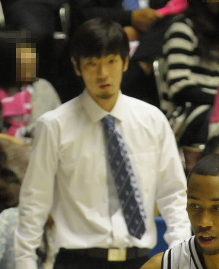 大分ヒートデビルズ、ザック・アトキンソン選手。秋田県立体育館で。